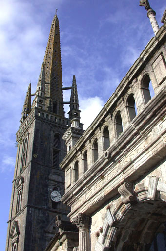 Tour Iliz Sizun.